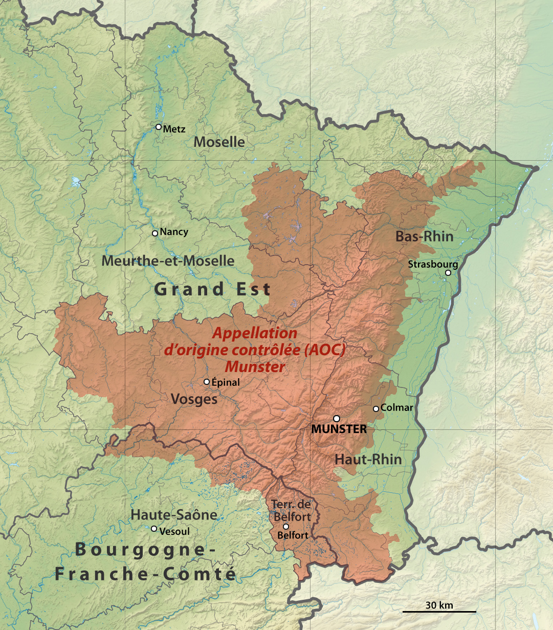 Karte der AOC Munster in Frankreich